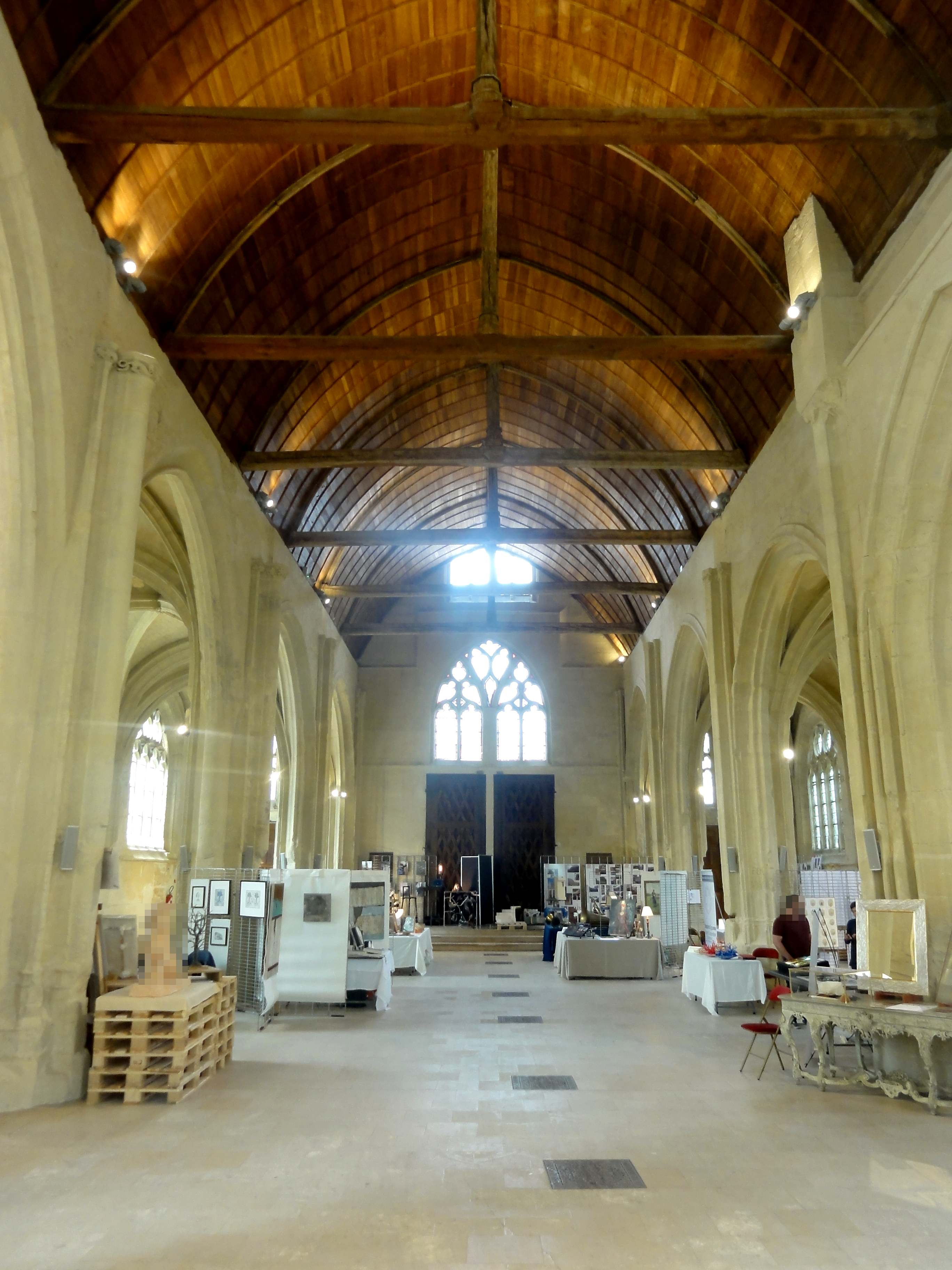 Intérieur de l'église - voir titre.